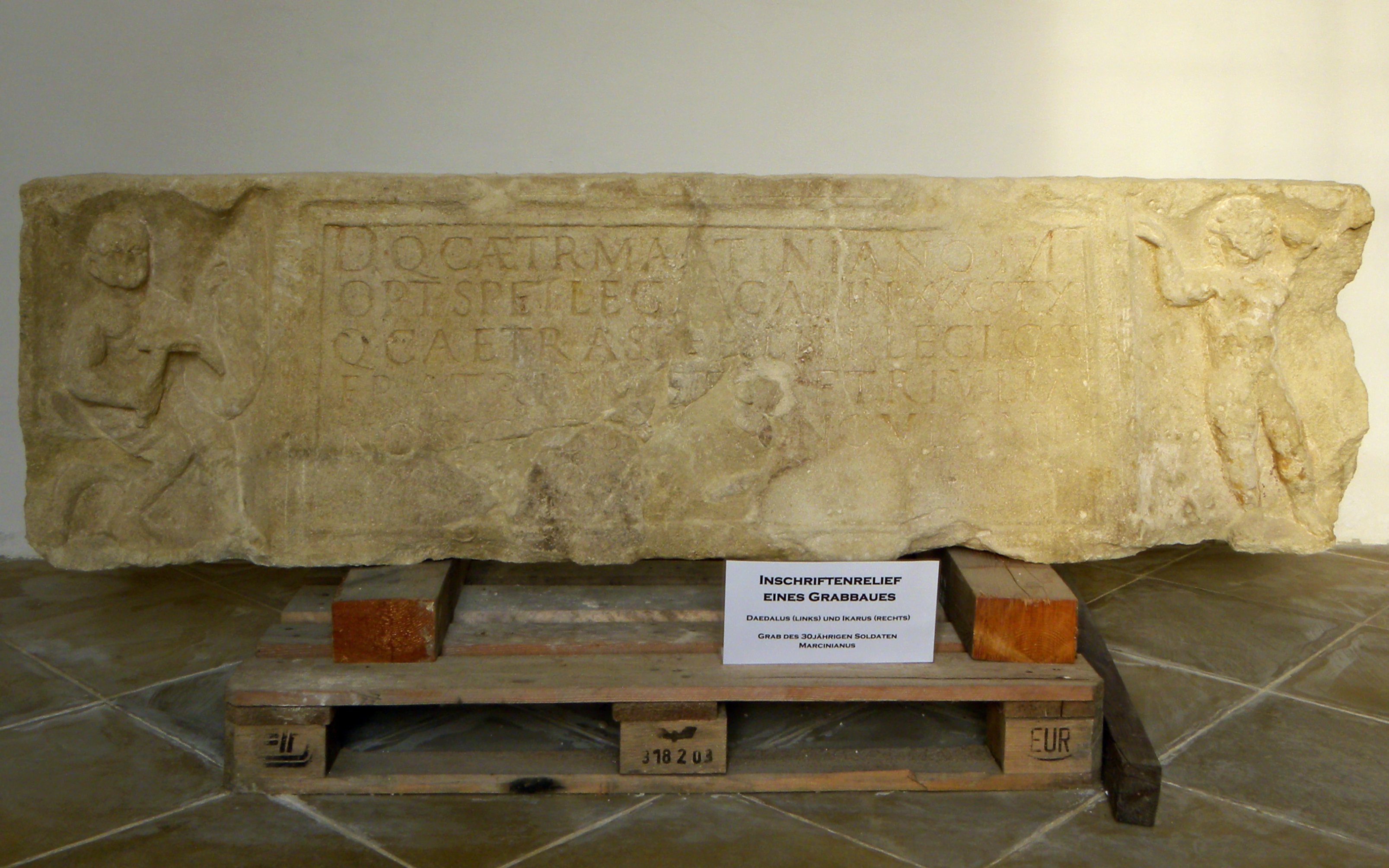 Dieses Bild wurde anlässlich des österreichischen Tags des Denkmals 2012 in Niederösterreich eingereicht.